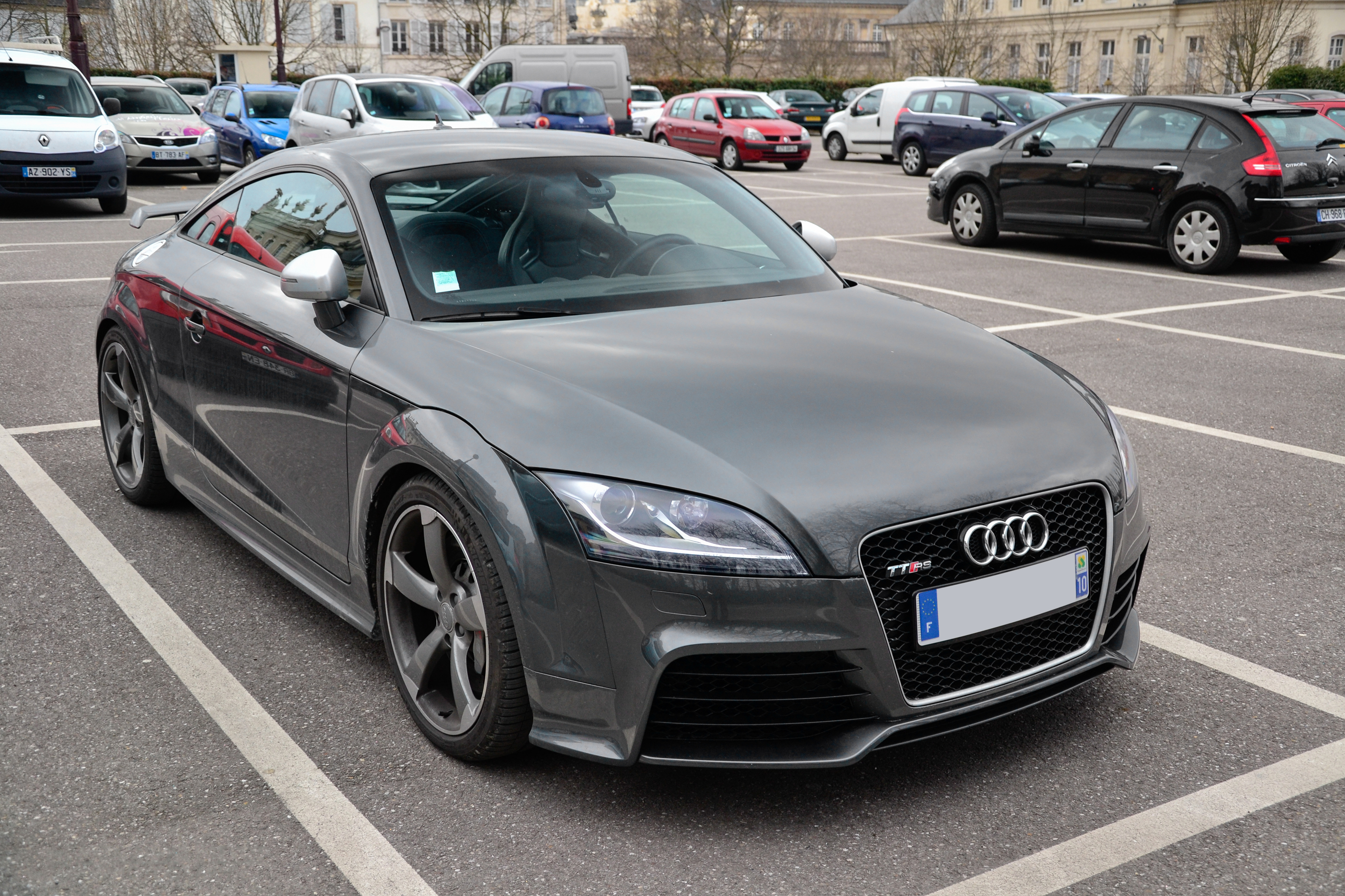 Audi TT RS